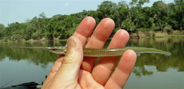 Pez aguja (Potamorrhaphis eigenmanni)